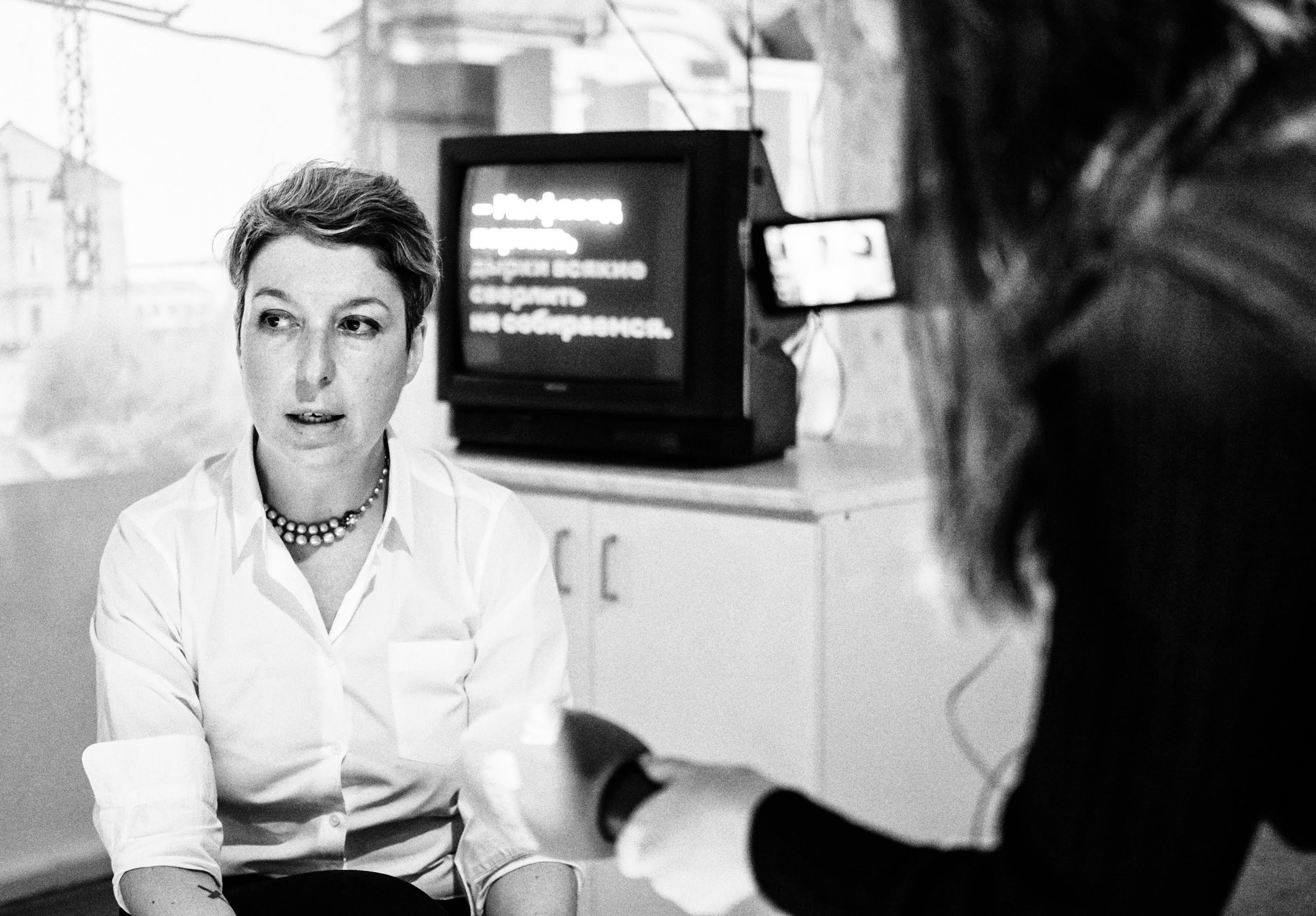 Анна Наринская